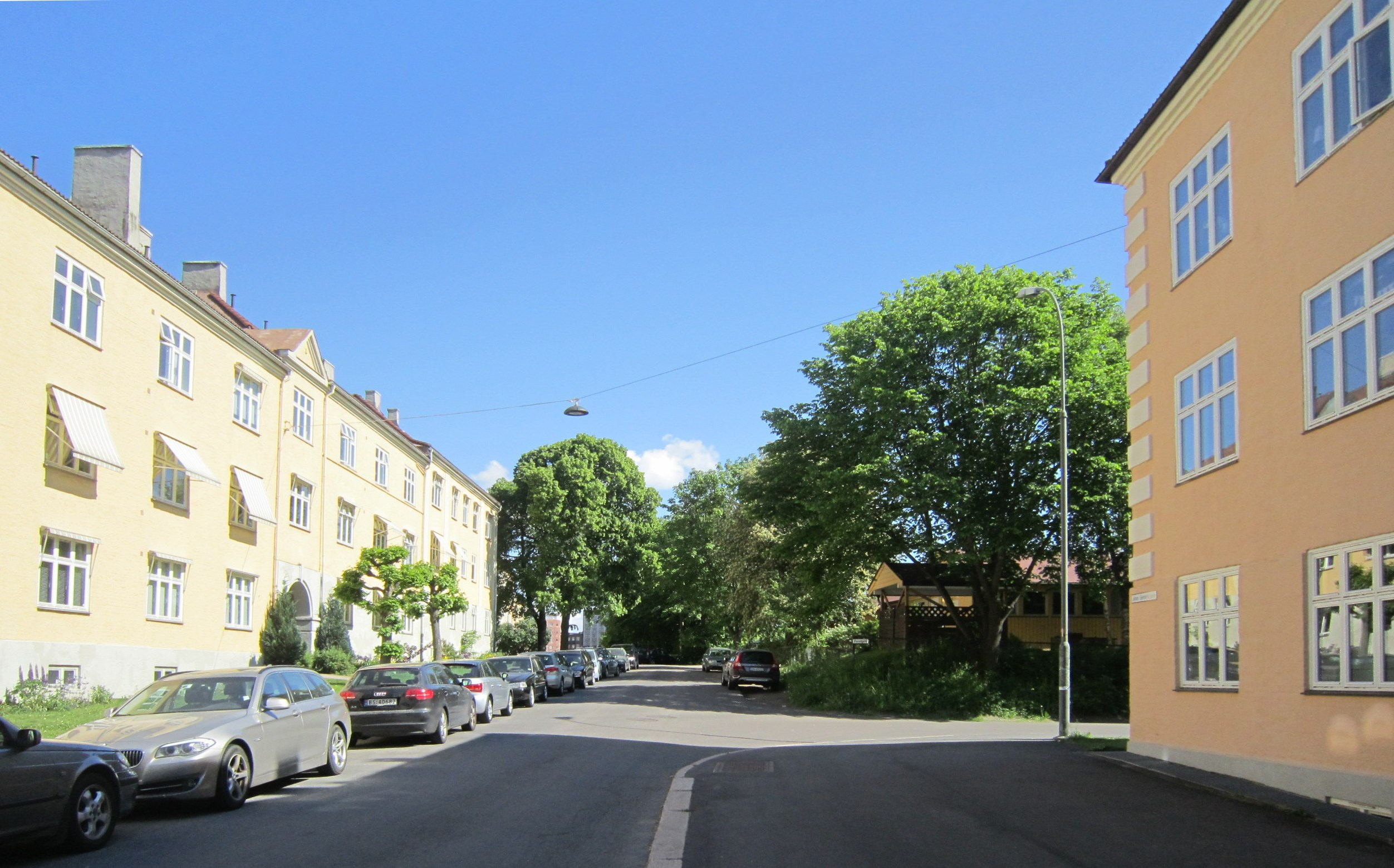 Johan Selmers gate på Torshov i Oslo